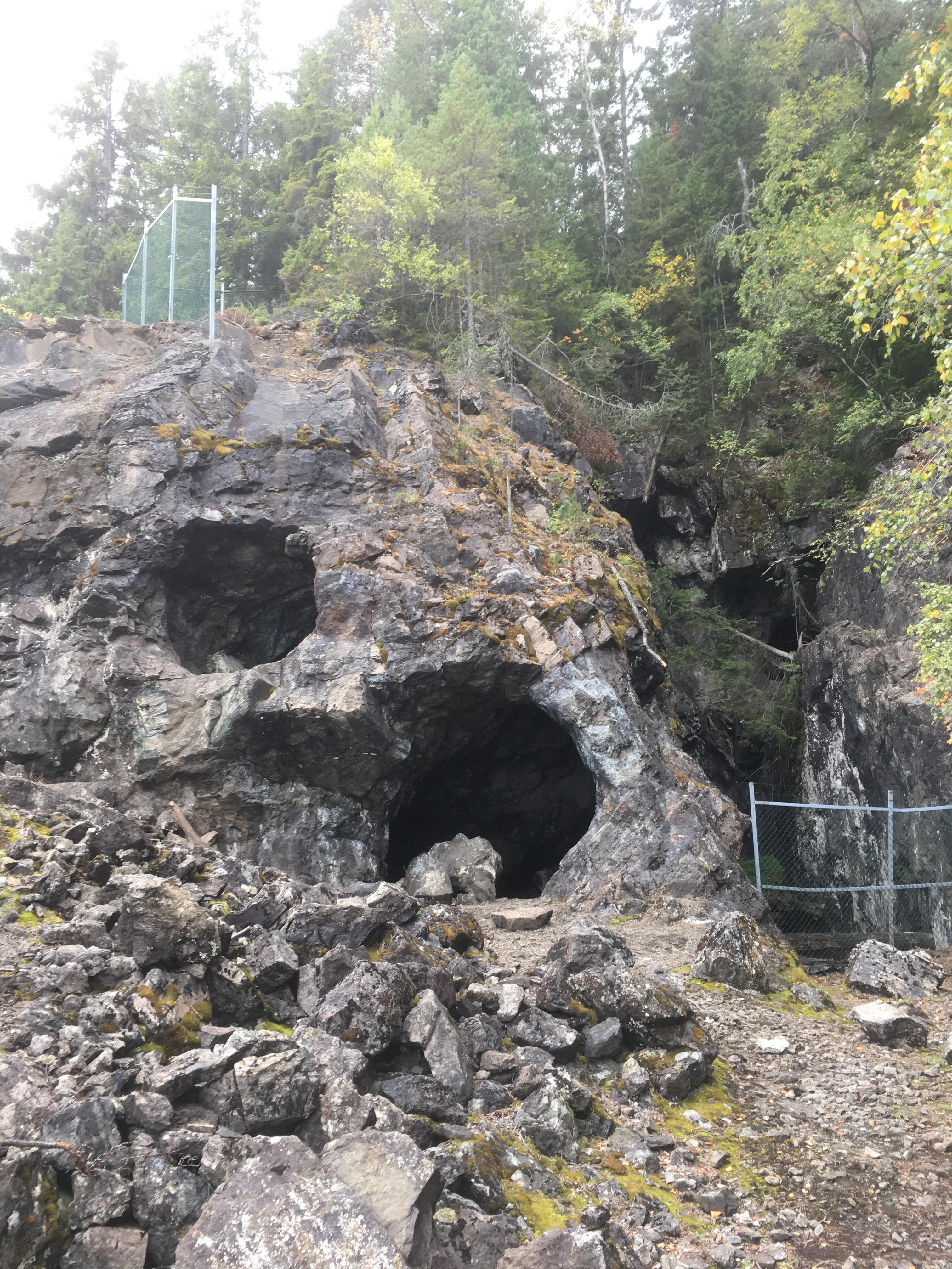 Gruvene på Konnerud